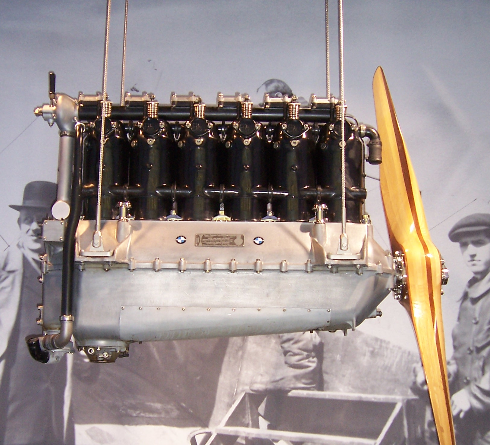 Flugtriebwerk BMW IIIa im BMW Museum